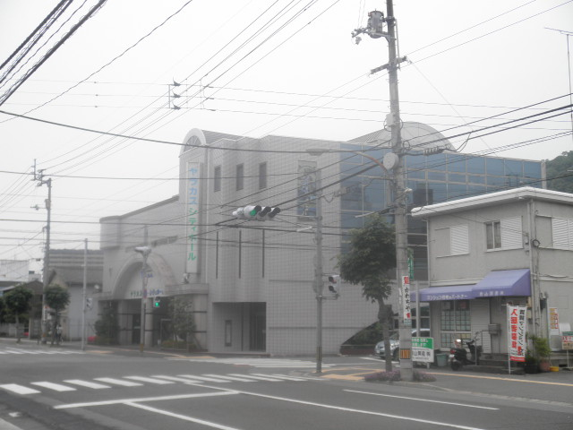 ヤラカスシティホール